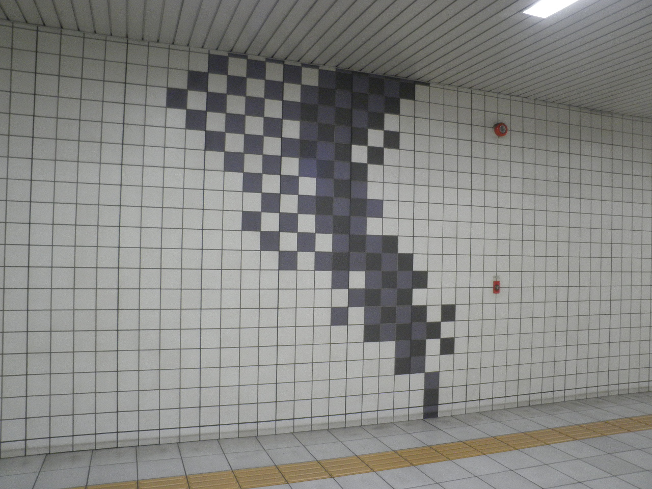 コンコースにあるタイル壁画